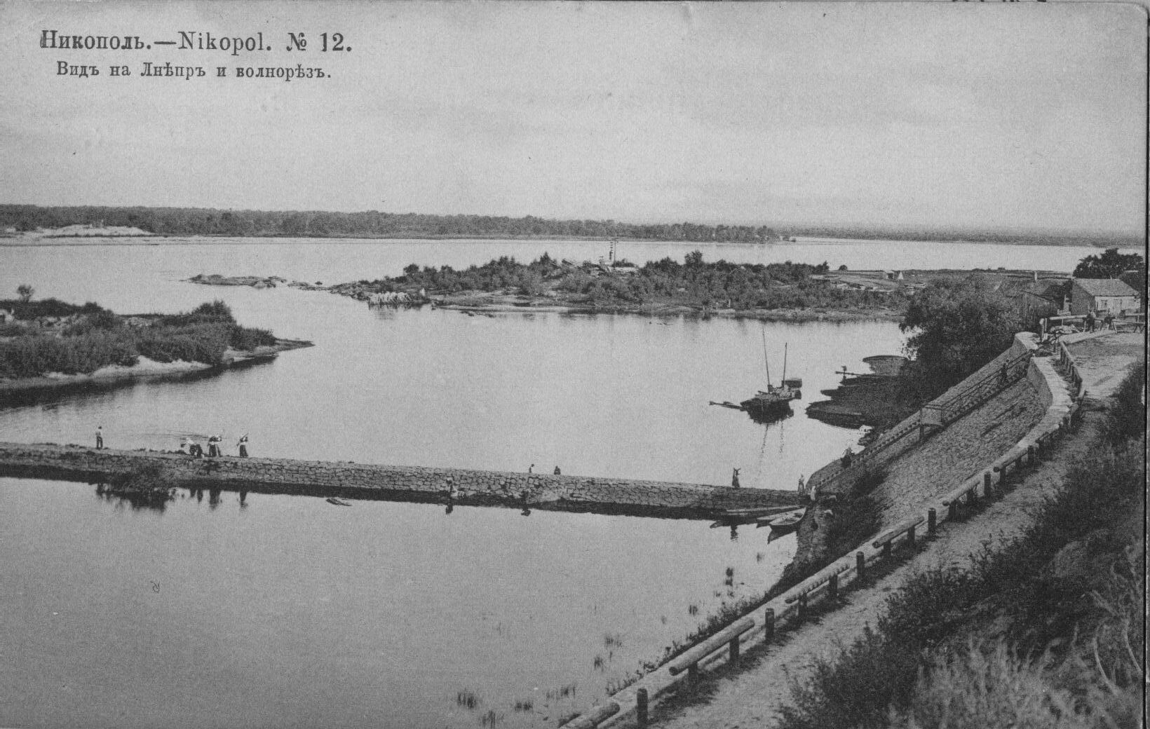 Вид на р.Днепр и волнорез в г.Никополь в начале XX века